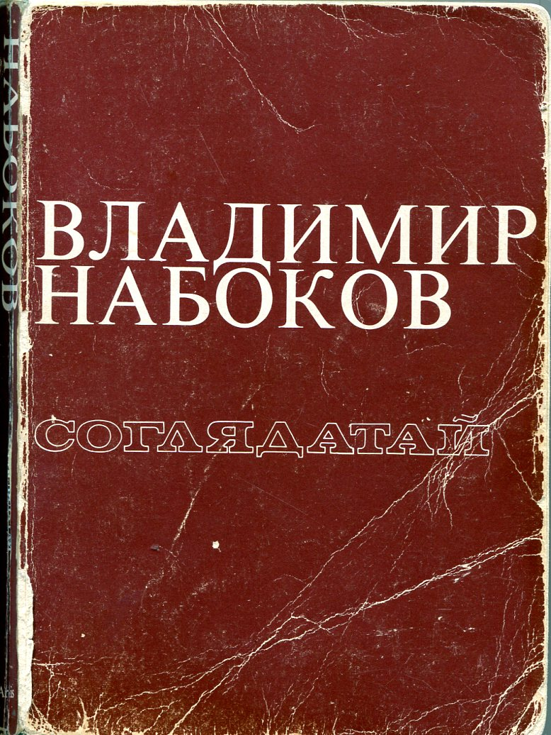 Обложка сборника рассказов "Соглядатый" В. В. Набокова, издательство "Ардис"